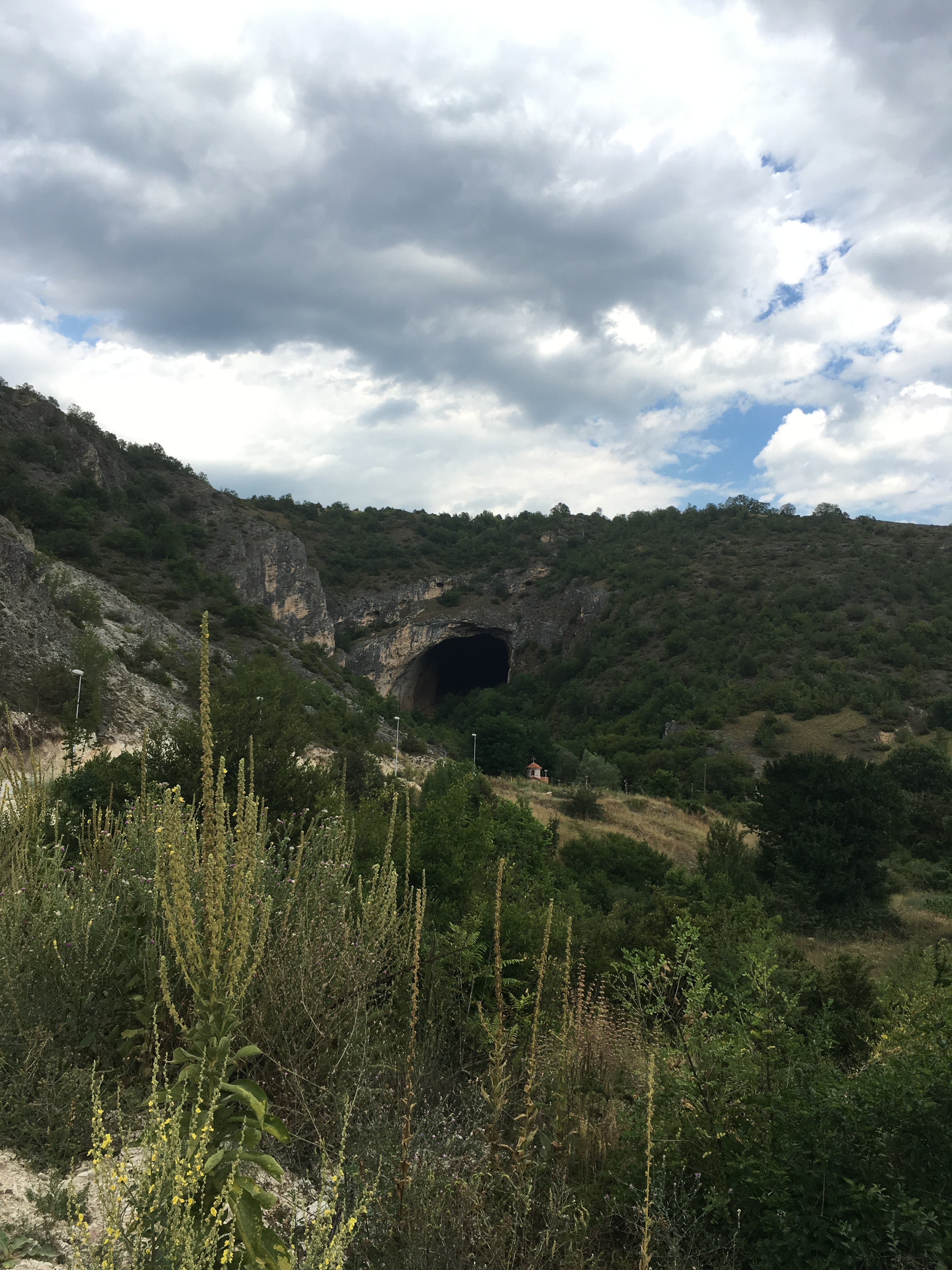 Пештера Пешна